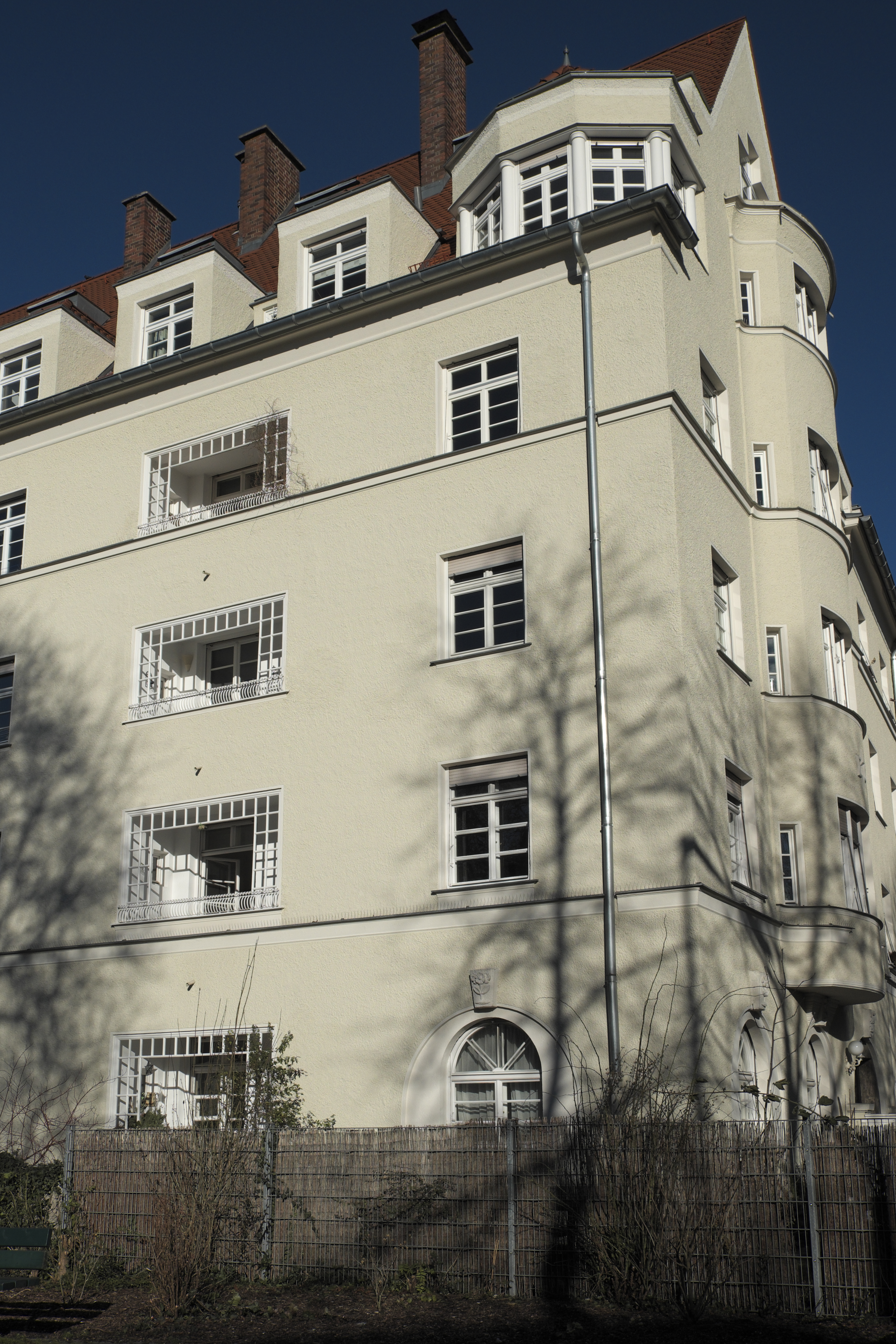 Mietshaus in der Heimeranstraße 6 im Stadtbezirk Schwanthalerhöhe in München (Bayern/Deutschland), 1926 von Franz Deininger erbaut